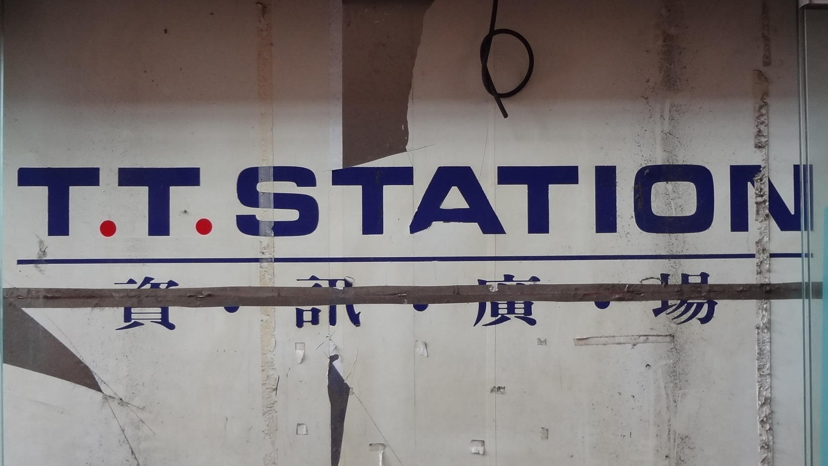 T.T.Station資訊廣場，位於臺北市中正區忠孝西路一段36號1樓及地下1樓（壽德大樓），已歇業。